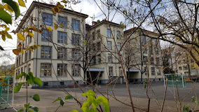 Foto des Schulhaus Hohl, Hohlstrasse 63 in Zürich (entstanden 2019)